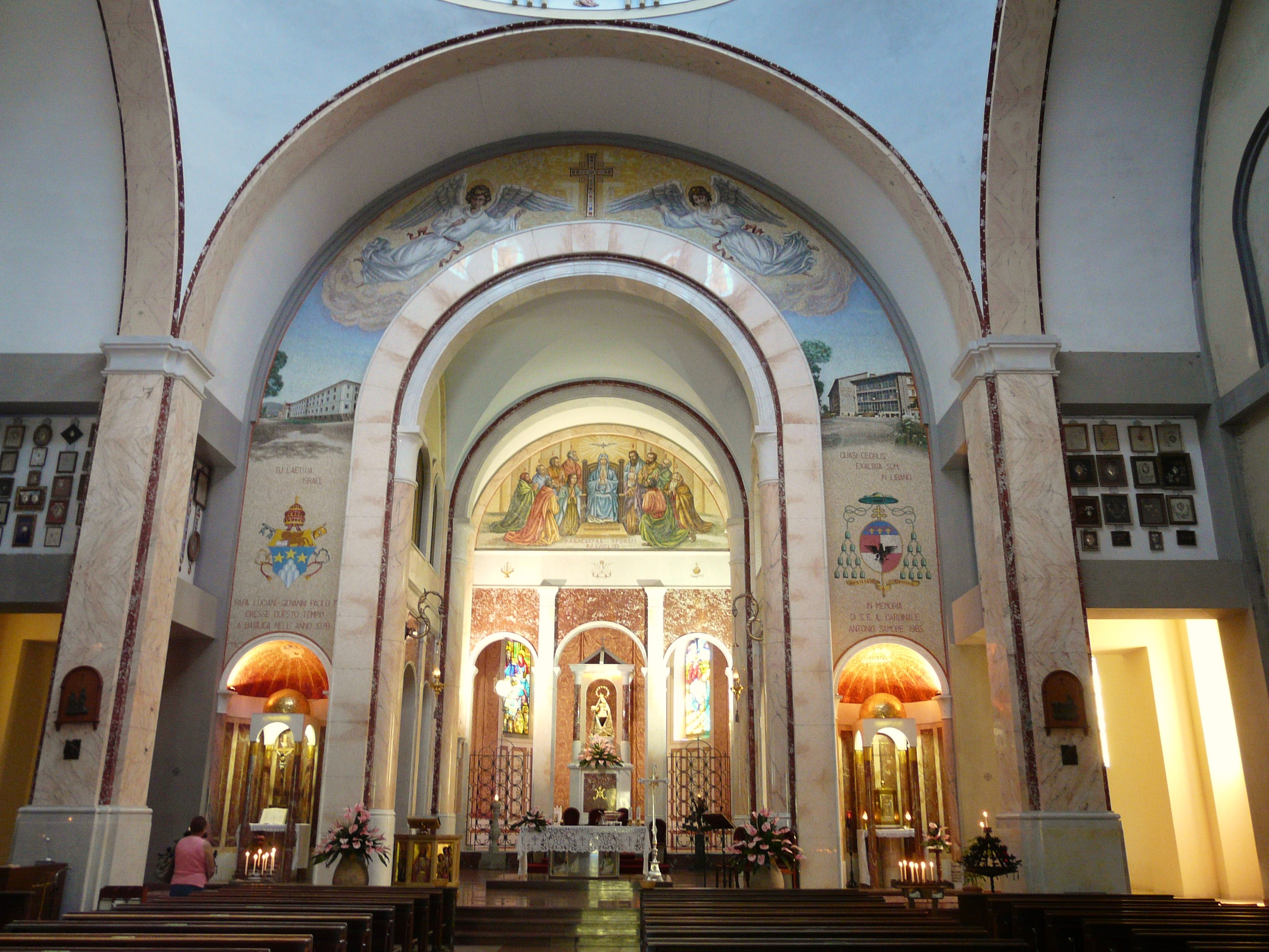 Immagini varie del santuario della Madonna di San Marco, Bedonia, Emilia Romagna, Italia